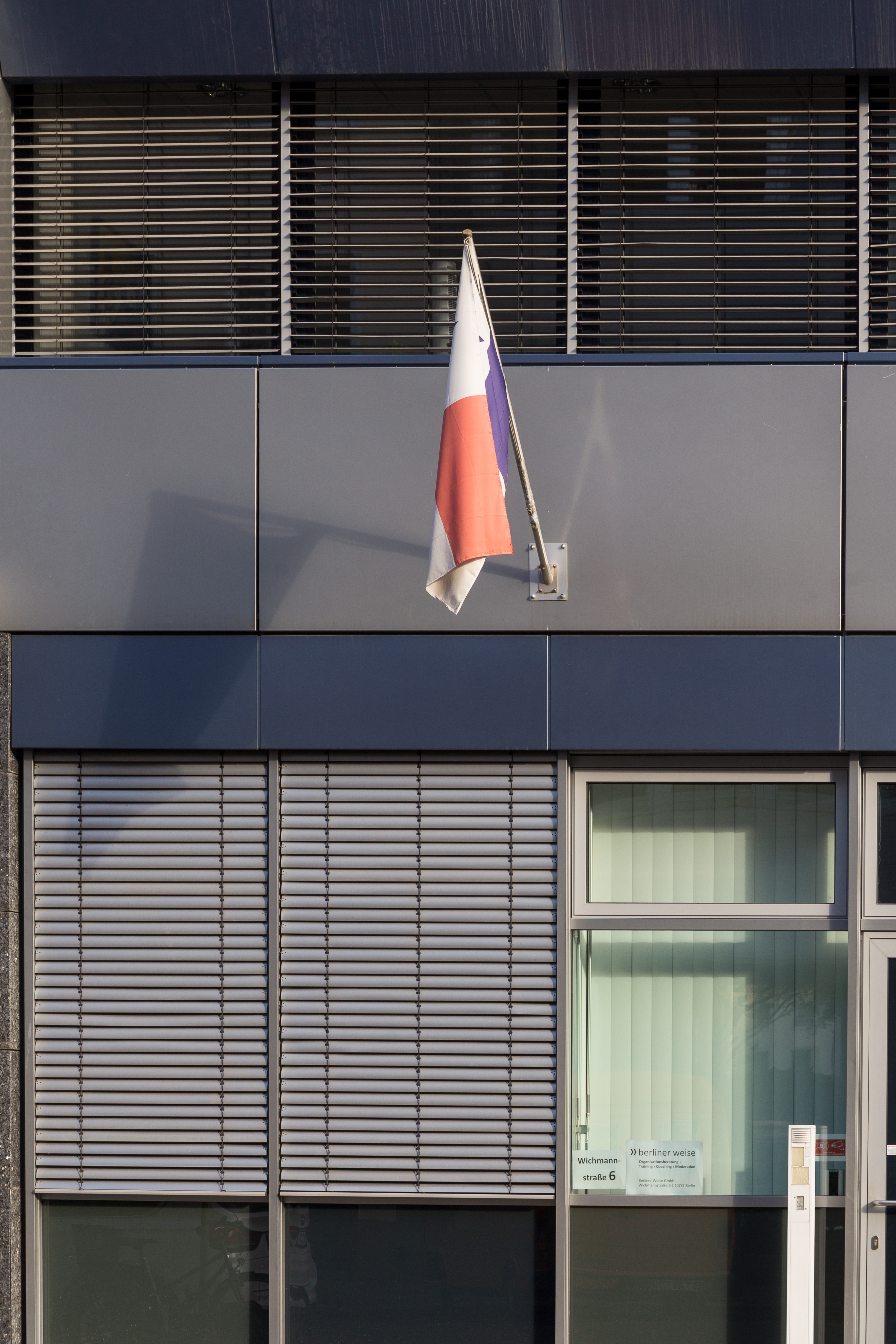 Ambassade du Panama à Berlin, Wichmannstraße 6.